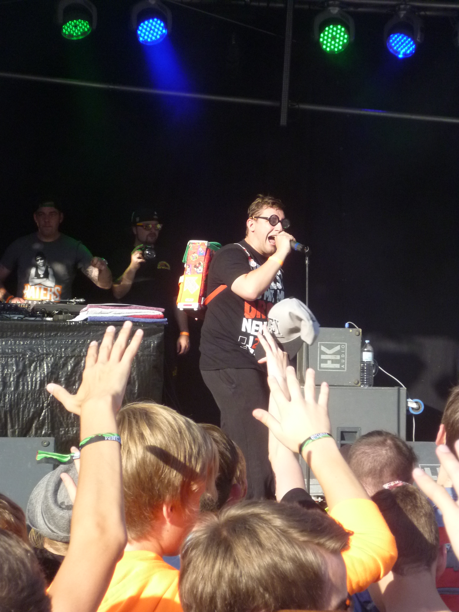 Battleboi Basti auf dem Rockem Festival 2013 in Neunkirchen (Saar)